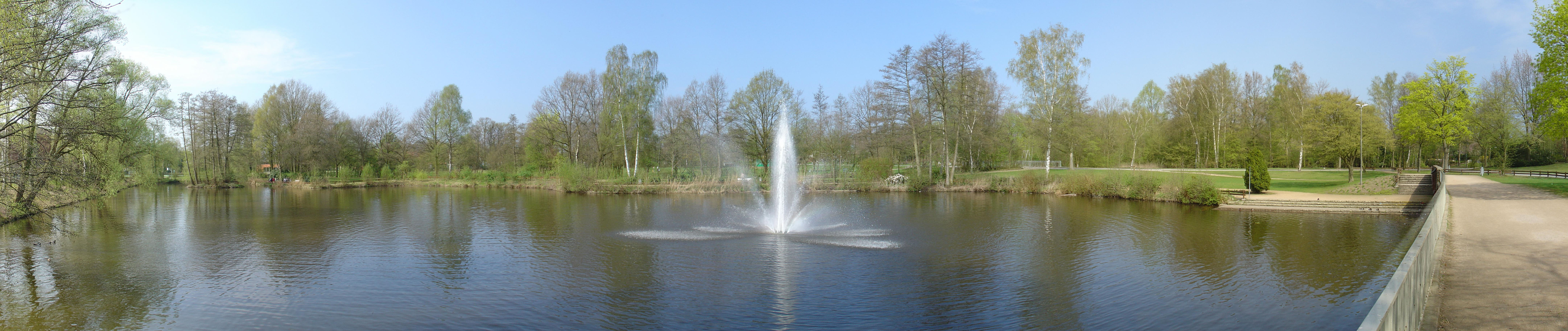 Panorama über den Schwanenteich im Moddenbachtal, Harsewinkel